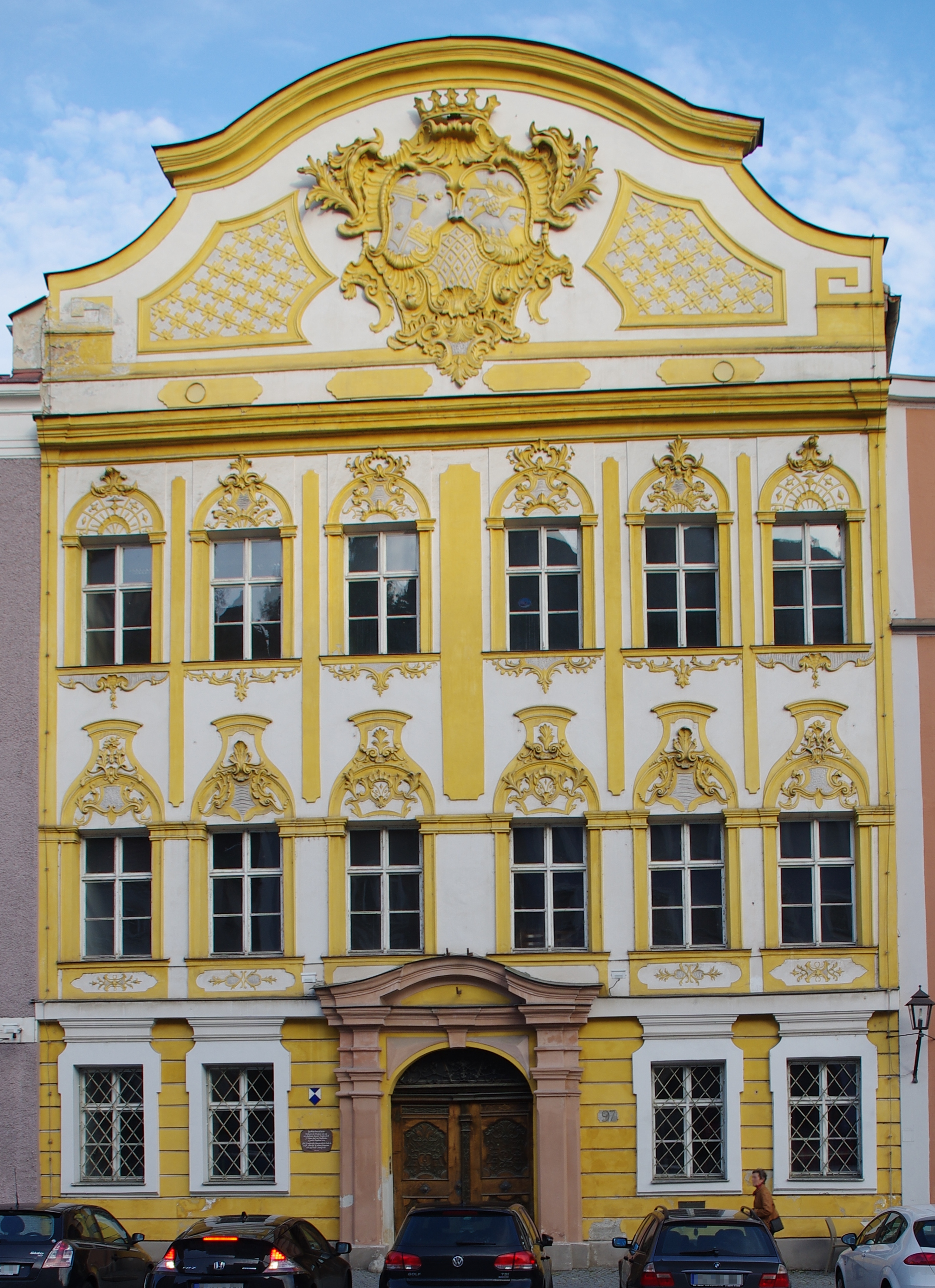 Tauffkirchenpalais, ehemals Wohnsitz des Vicedoms, später AmtsgerichtThis is a photograph of an architectural monument.